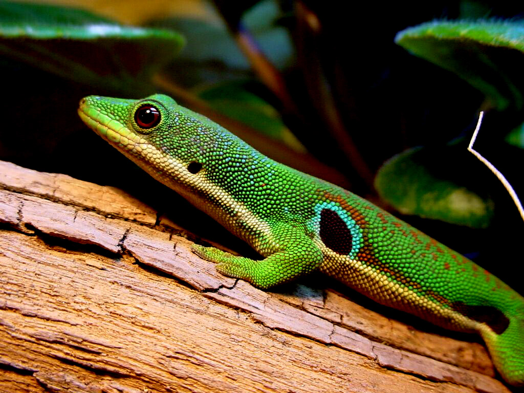 Phelsuma quadriocellata quadriocellata, Männchen, Terrarienaufnahme. – Man sieht hinter den Vordergliedmaßen und vor den Hintergliedmaßen die namensgebenden Flecken („Augen“).